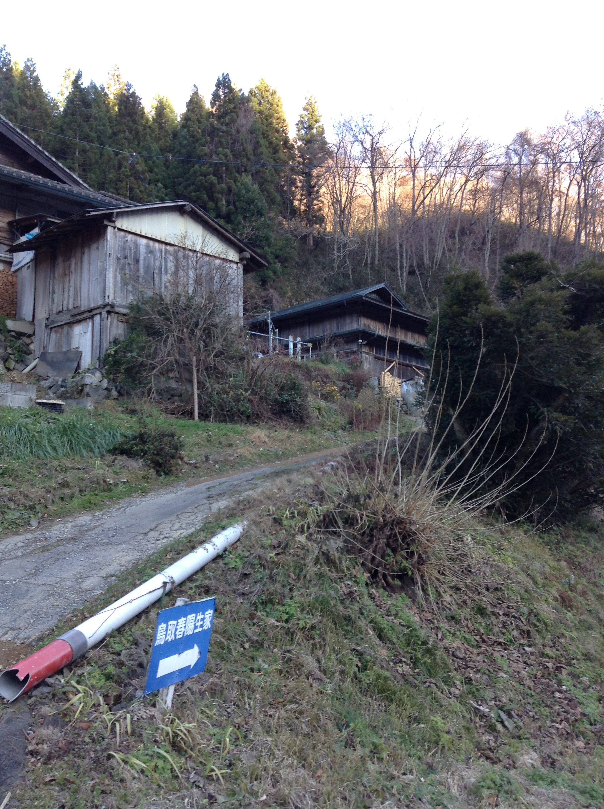 いまなお残る演歌師の生家。